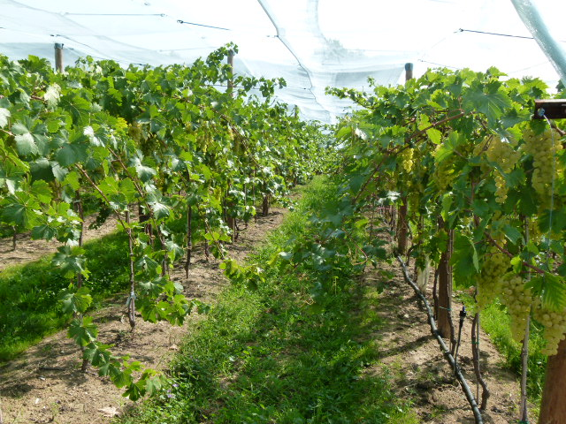 Culture de Chasselat de Moissac en T-Bord